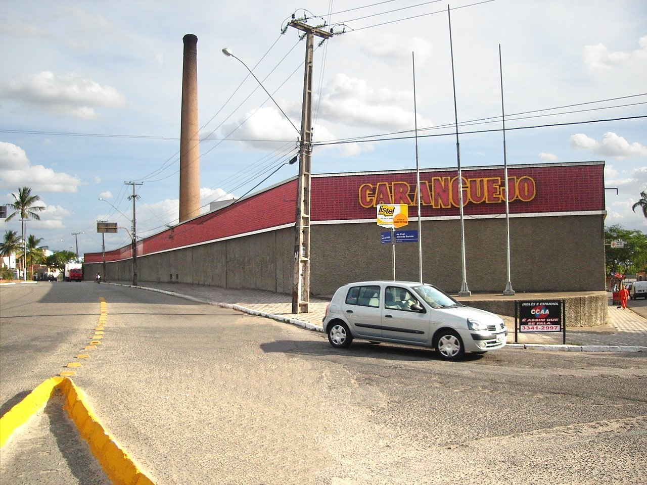 Fábrica da Caranguejo (Caranguejo Factory), Campina Grande, Brasil.